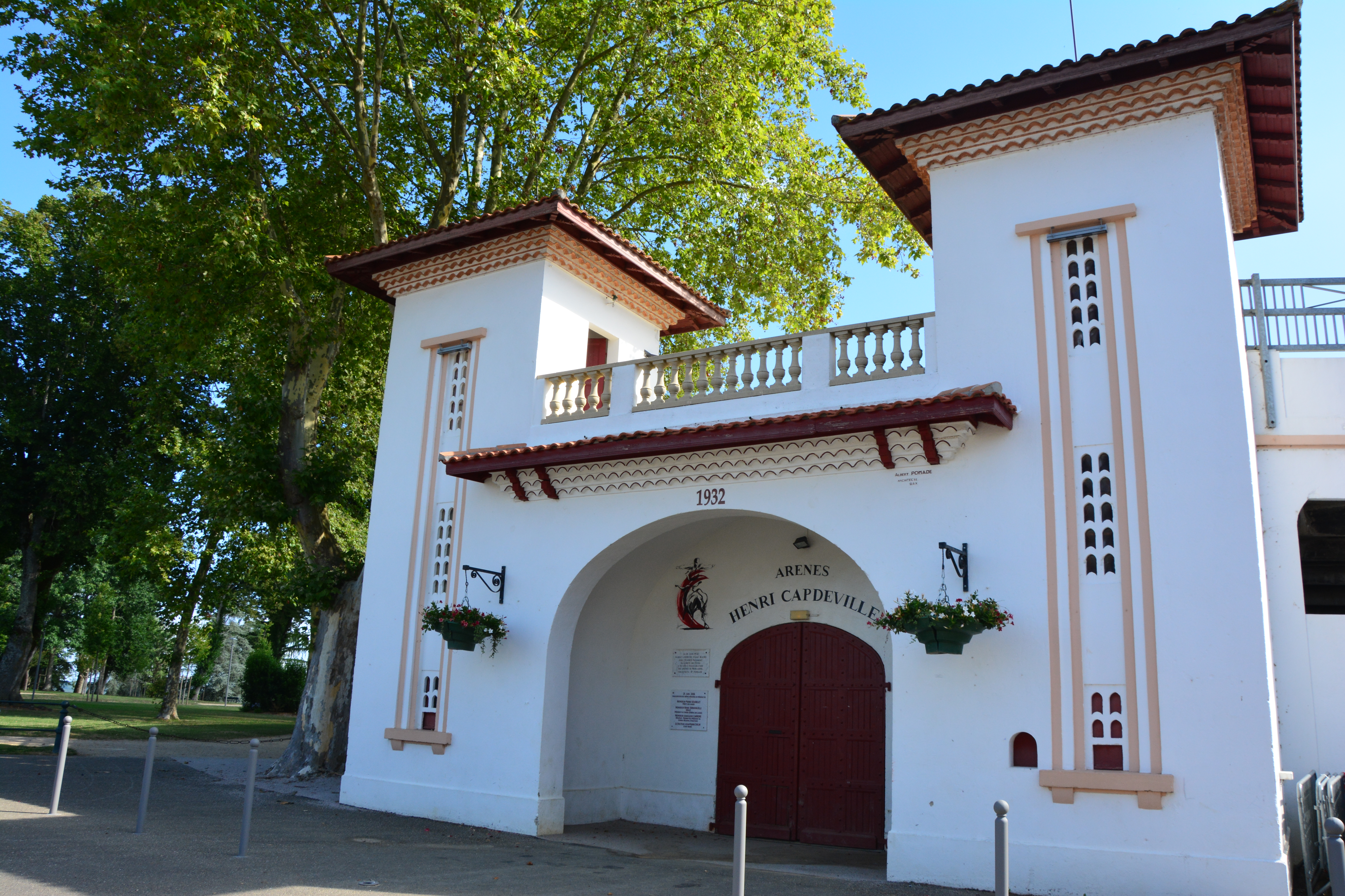 Entrée des Arènes Henri Capdeville